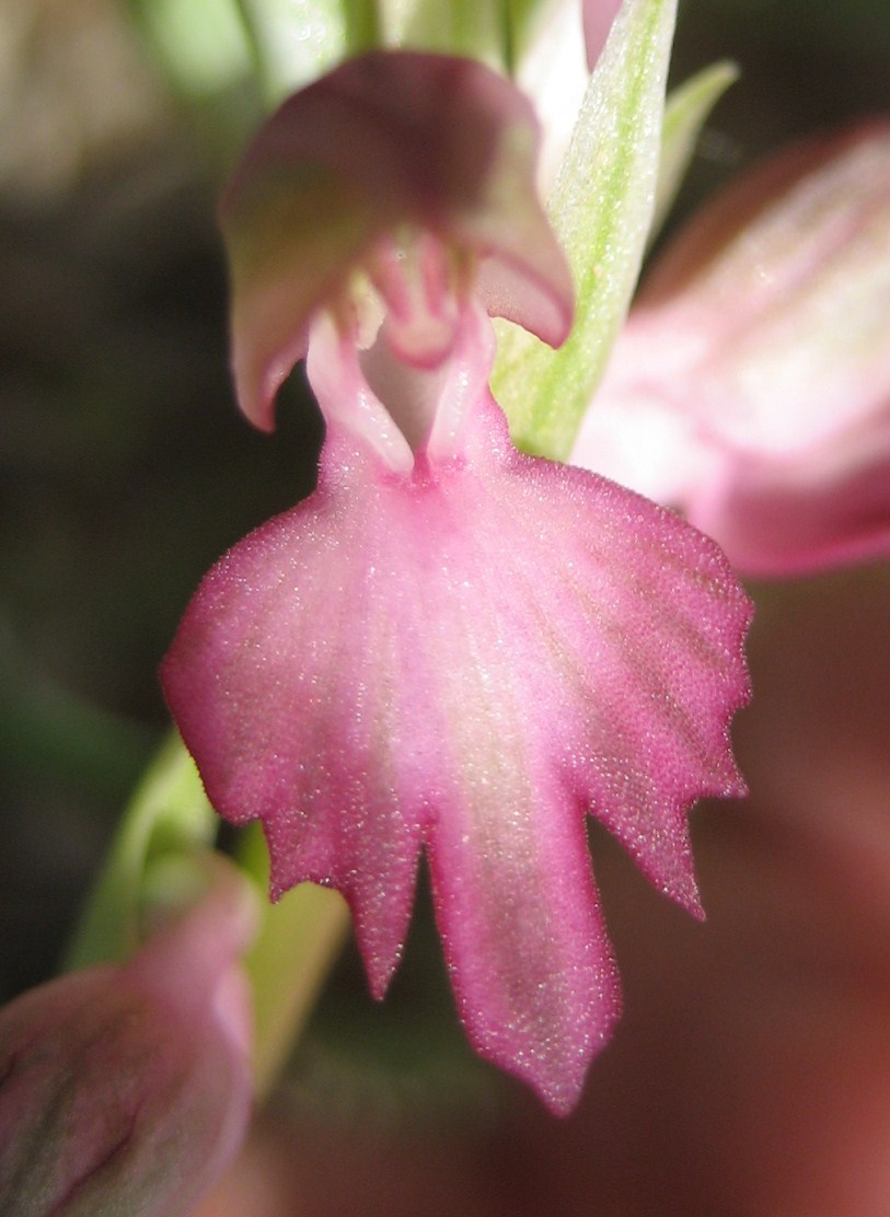 Anacamptis sancta ,Orchis sancta. Chios, Greece